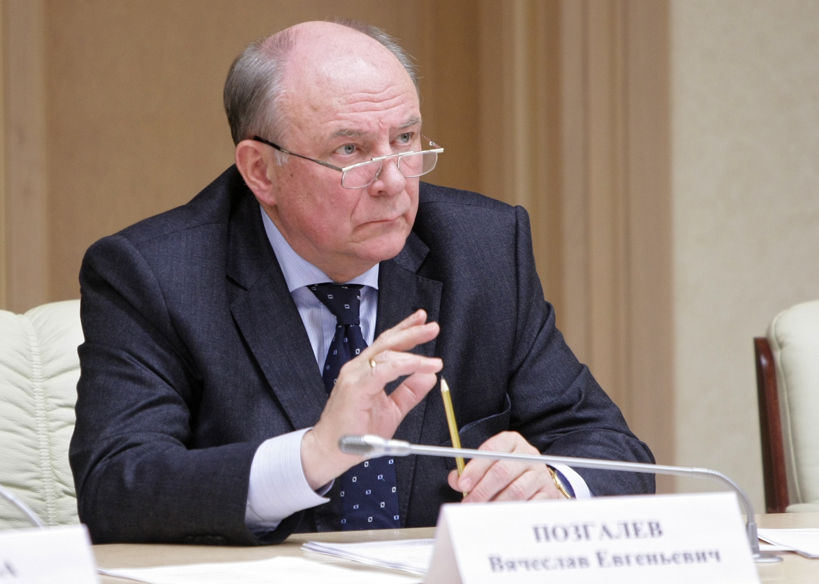 Губернатор Вологодской области В. Е. Позгалёв на совещании по программам модернизации здравоохранения в субъектах Российской Федерации Северо-Западного федерального округа на 2011-2012 годы